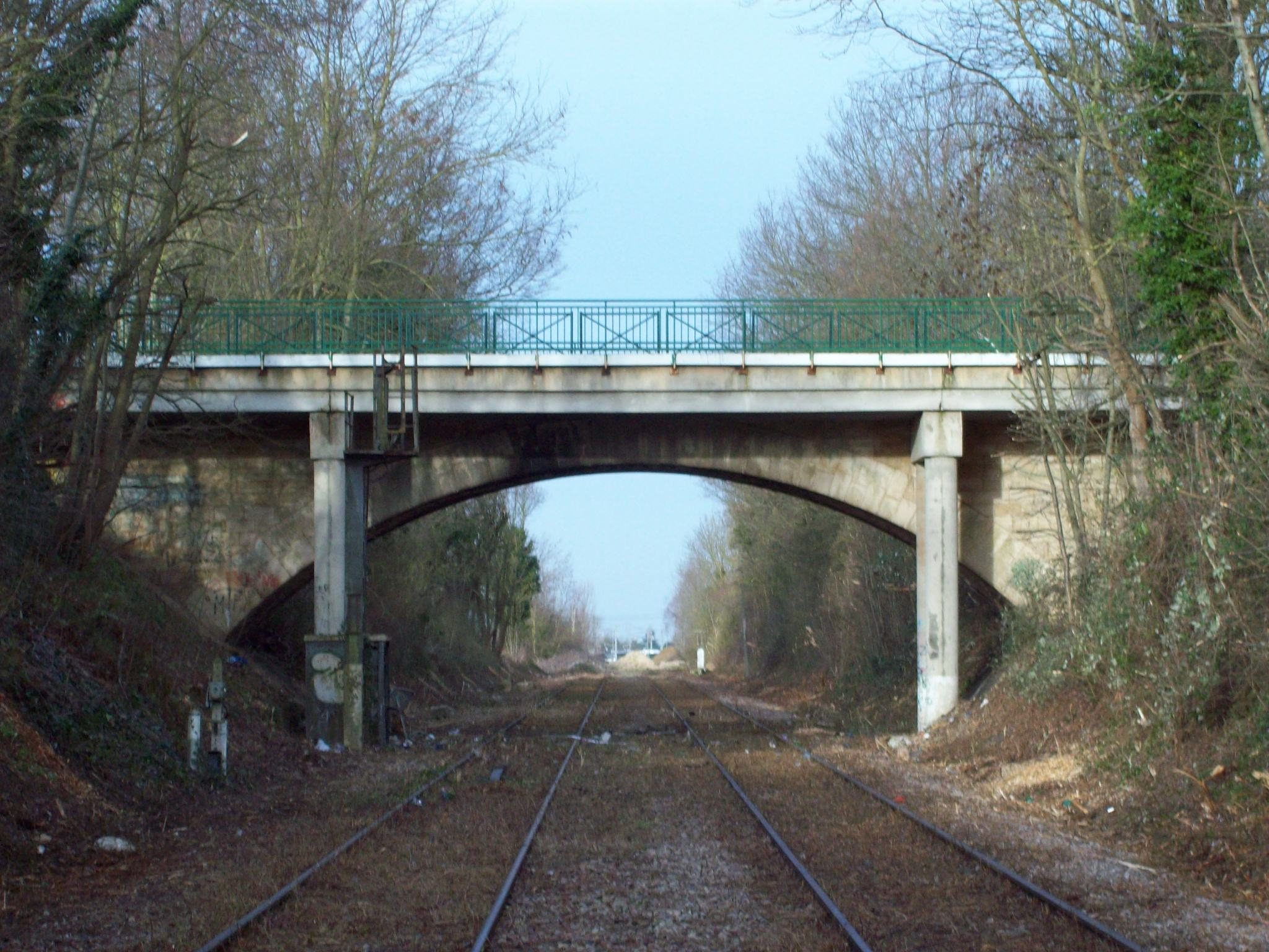 Pont à Noisy-le-Roi.